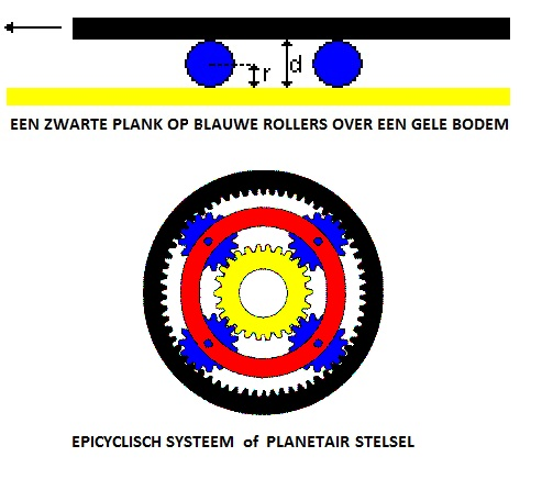 Werking drie-versnellingsbak